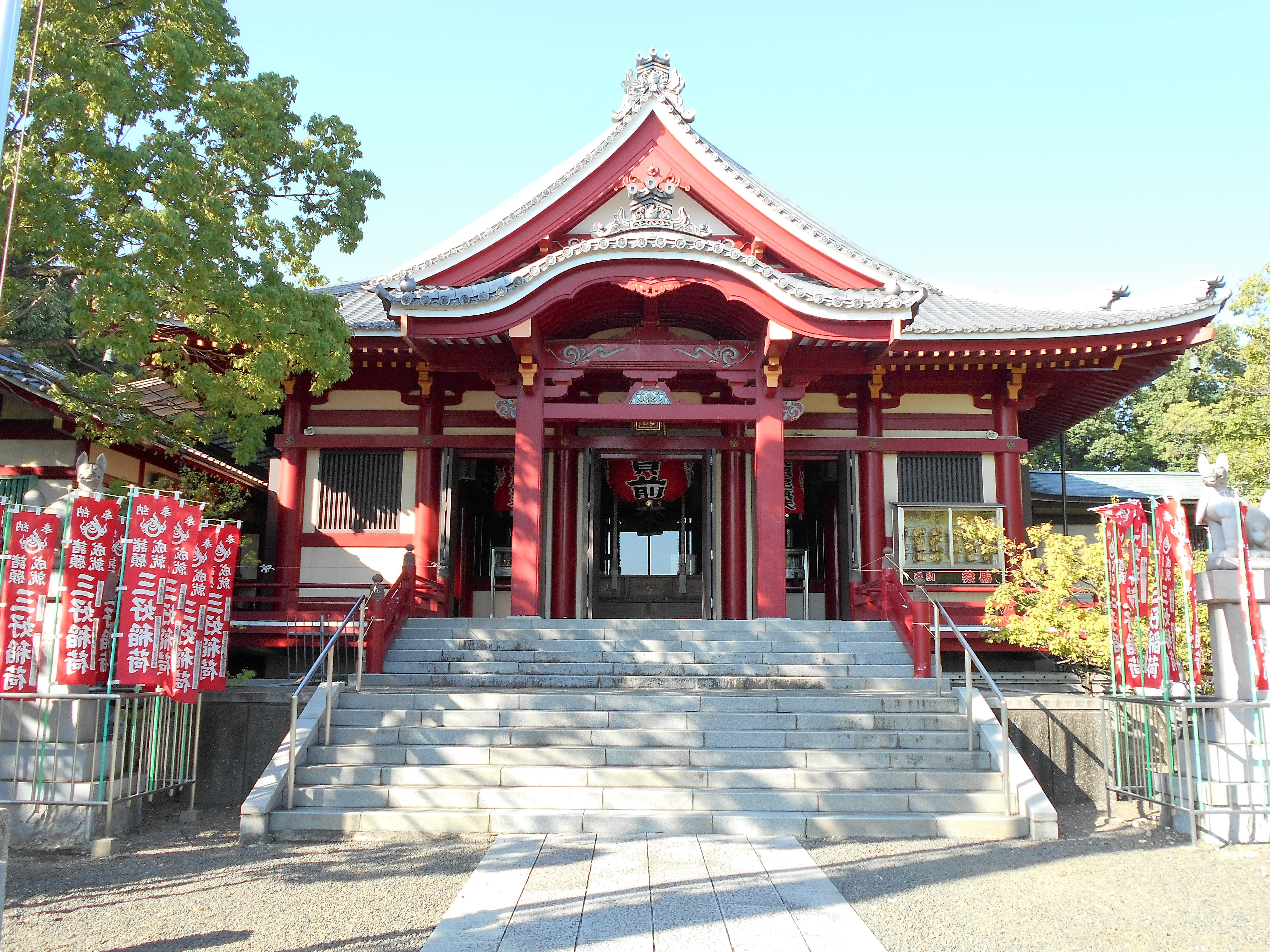 三好稲荷閣 本殿（愛知県みよし市、2016年8月）